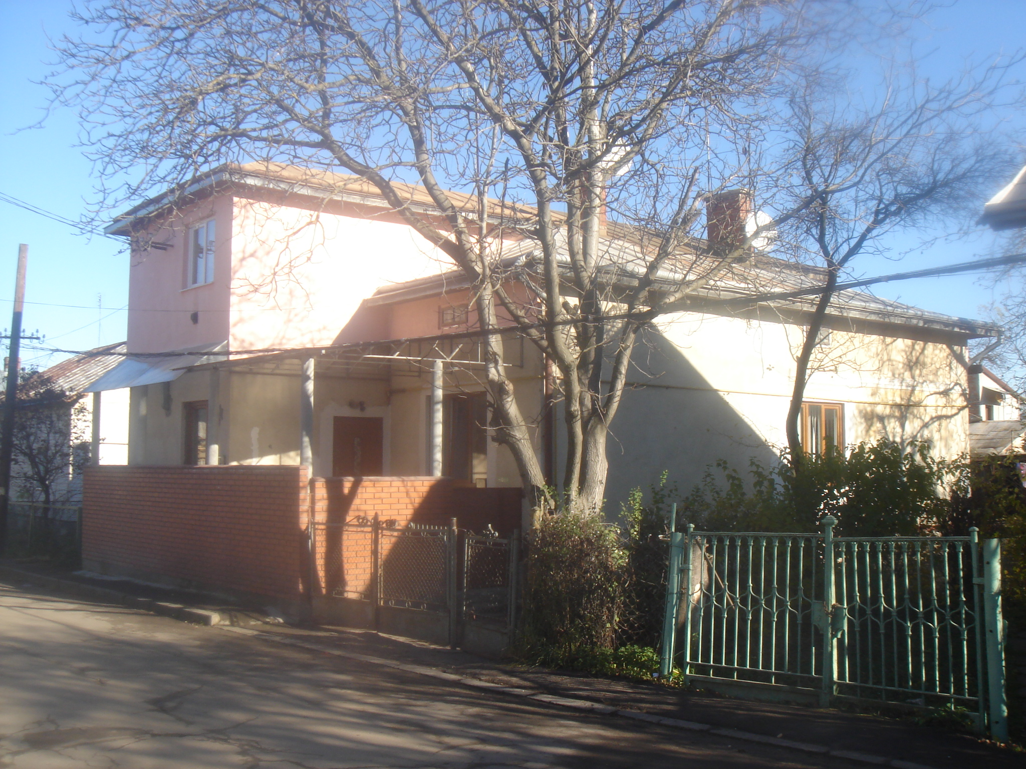 Будинок, в якому жив Бурко Д., сотник УГА, викладач української гімназії (худ.-мем. табл., 1992, мармур)., Дрогобич, вул. В Стуса, 12